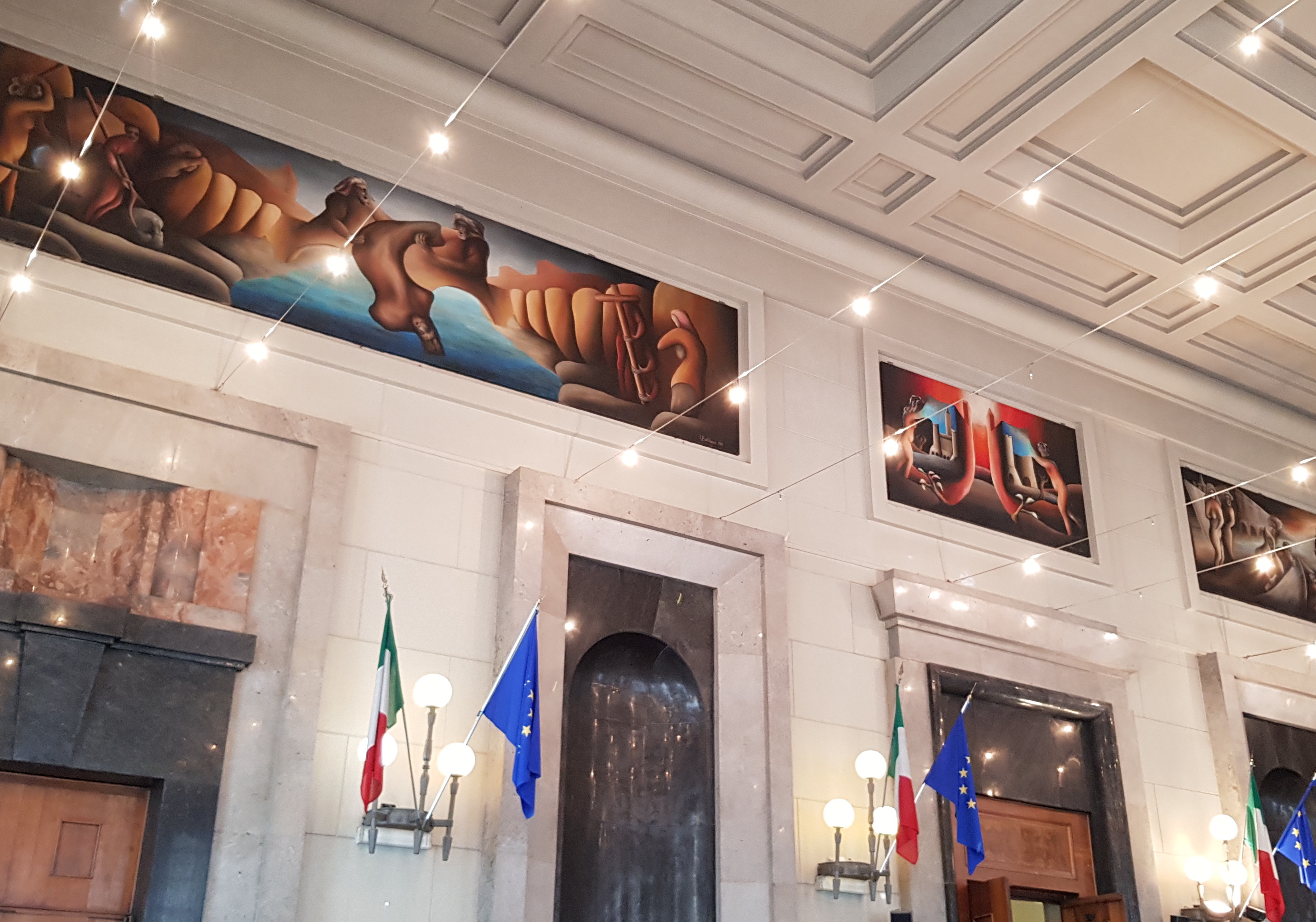 Palazzo di Città in Pescara, interior